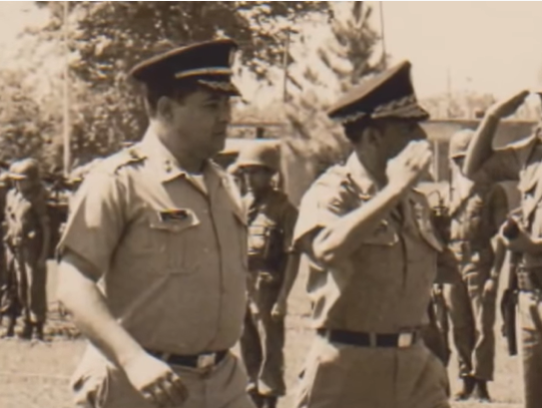 Gral. Alvarez Martinez y Col. Ruiz Andrade